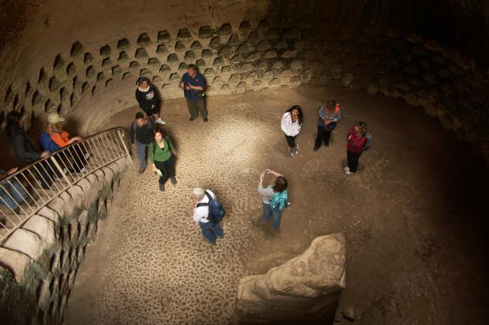 על שום סמל הצבא הפולני (נשר) אותו ציירו חיילים פולניים במערה בשנת 1943.